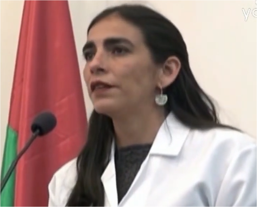 Ministra Gabriela Montaño en julio de 2019